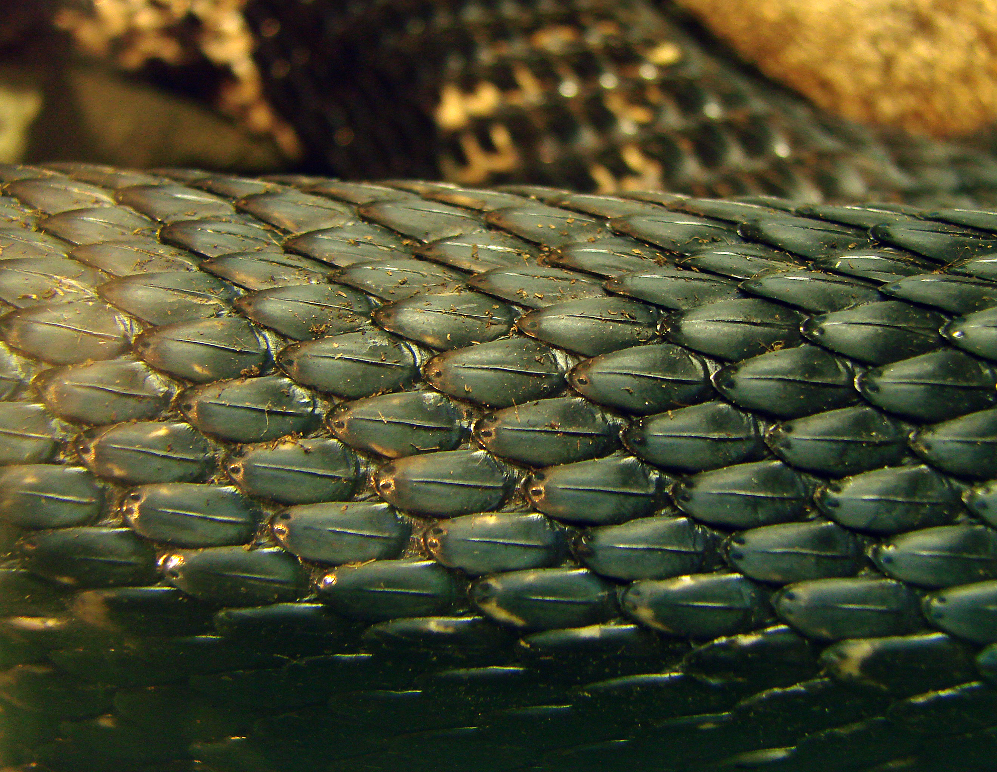 Détail des écailles d'un serpent taureau ( Pituophis melanoleucus, habitat Canada et Nord des USA). L'Ile aux Serpents, à La Trimouille (86).